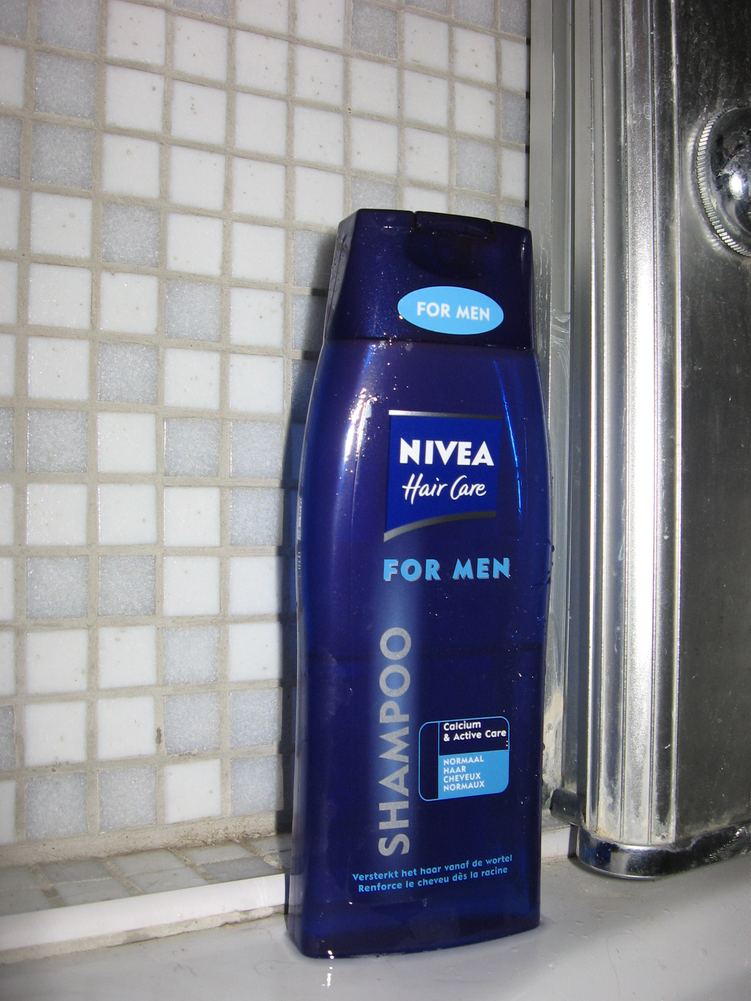 shampoo